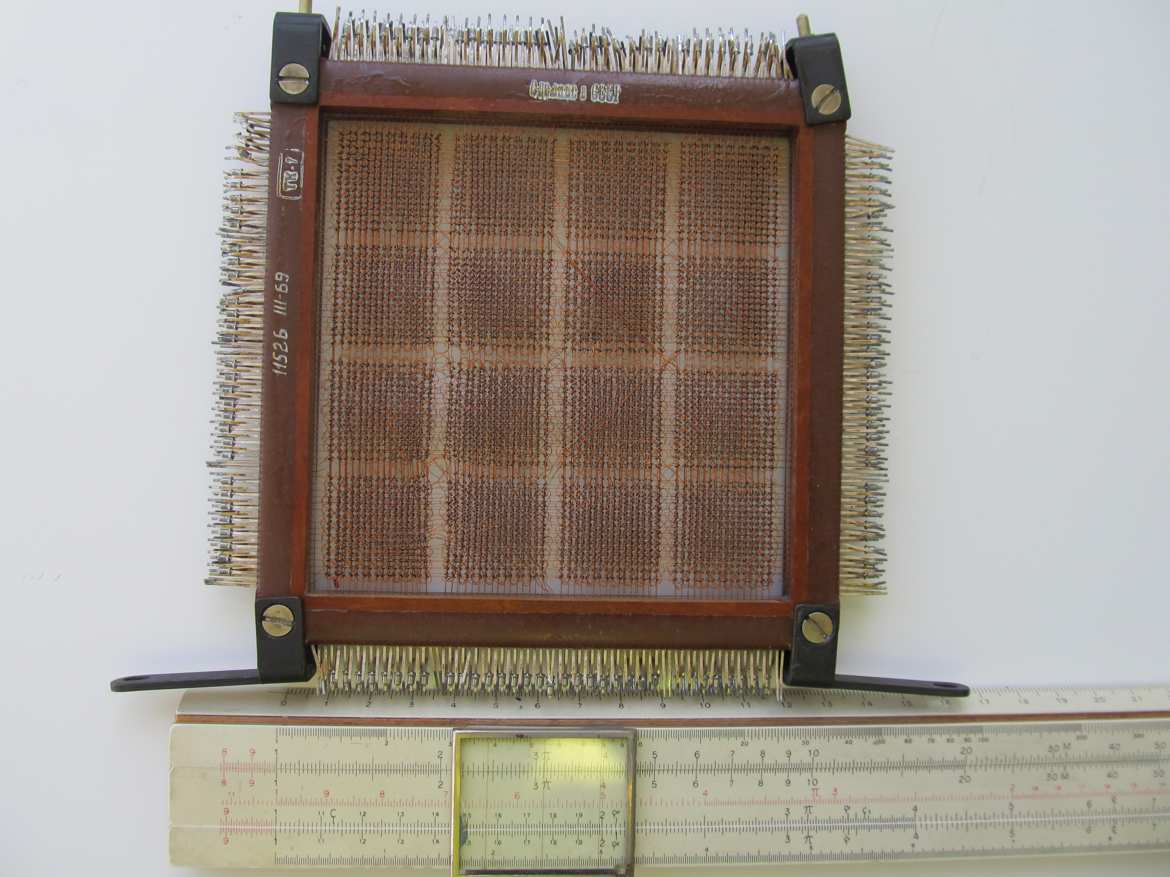 Ferritkernspeicher aus der BESM-6 des VEB Kraftwerksanlagenbaus Berlin.